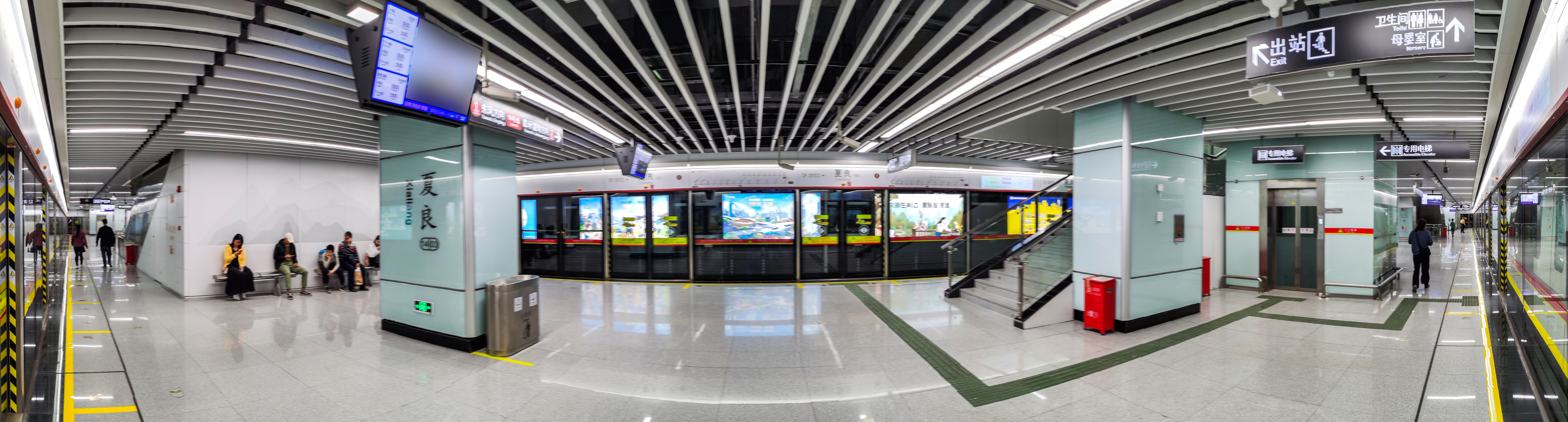 广州地铁夏良站